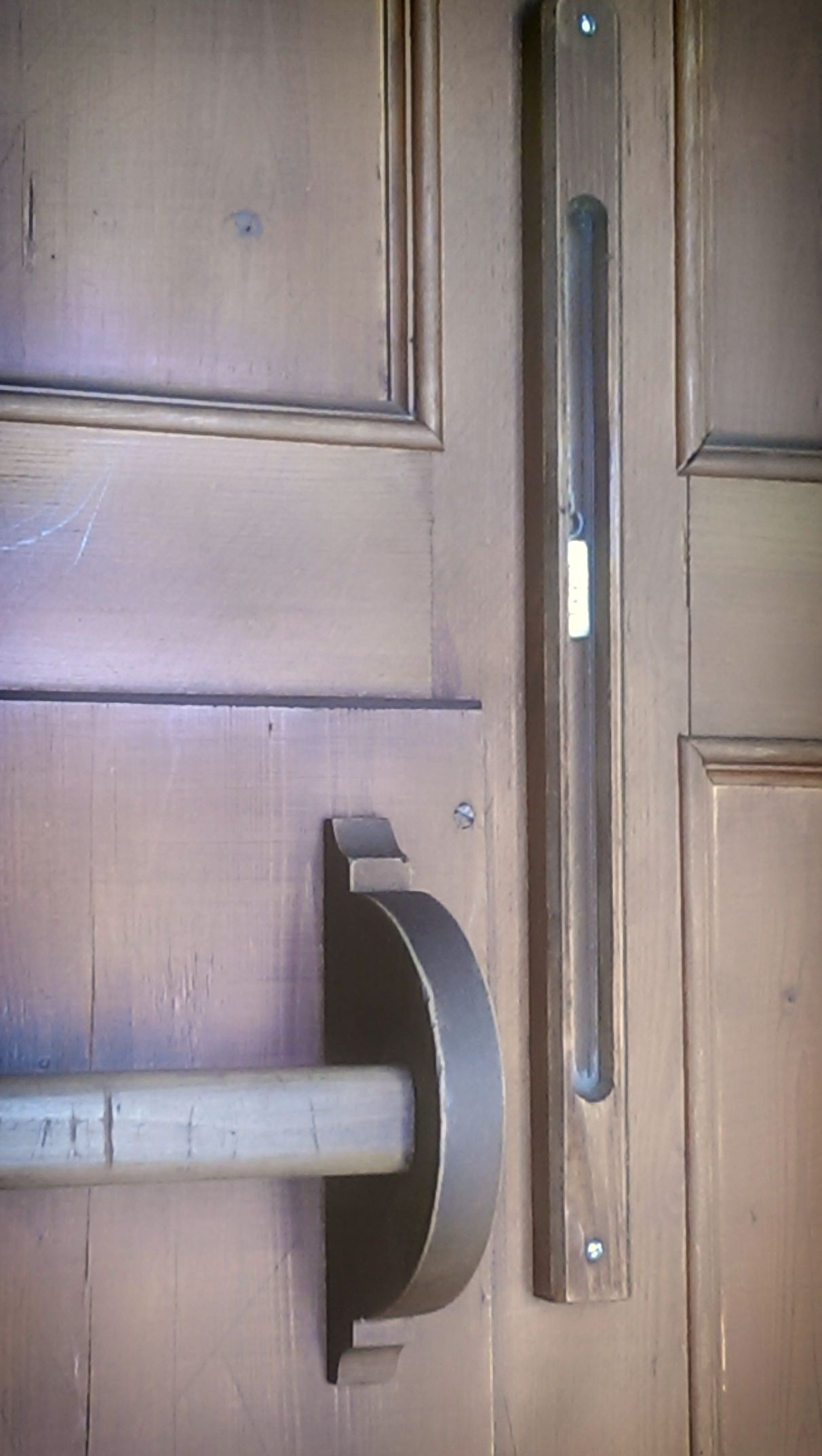 Schlimbach Orgel